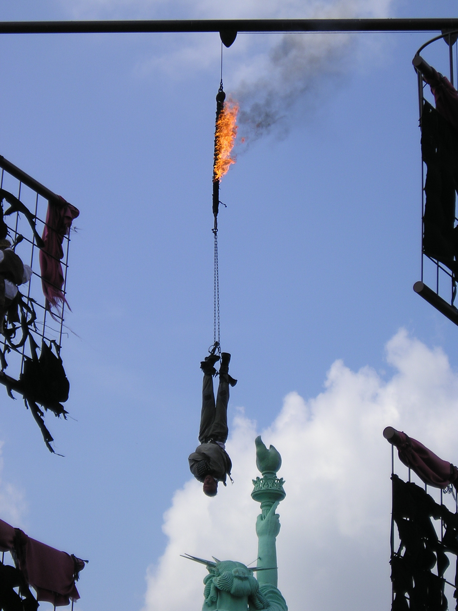 Szene aus der Piratenshow (2004) im Heide-Park Soltau. Ein Künstler an einem brennen Seil.